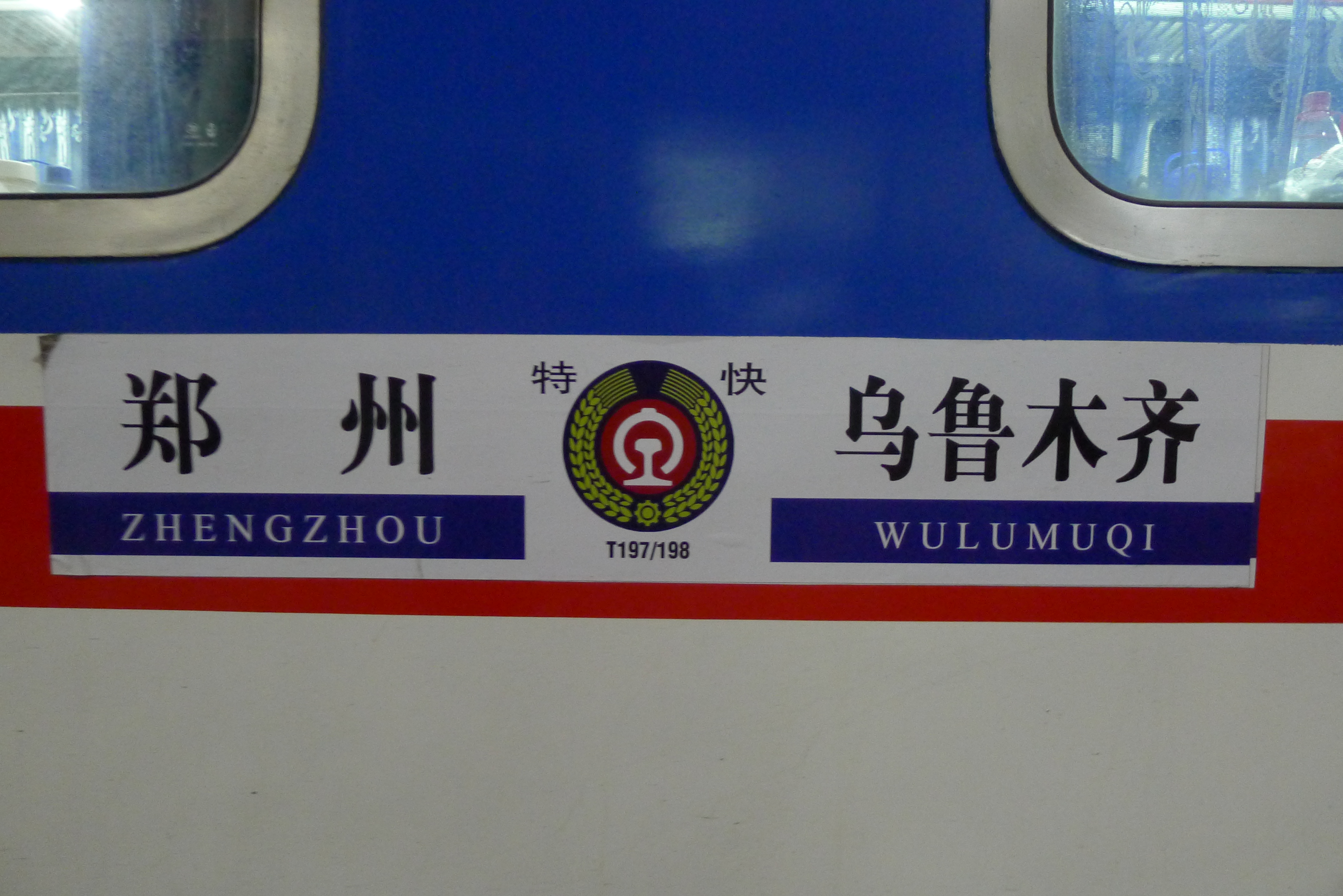 T197/198次列车水纸。